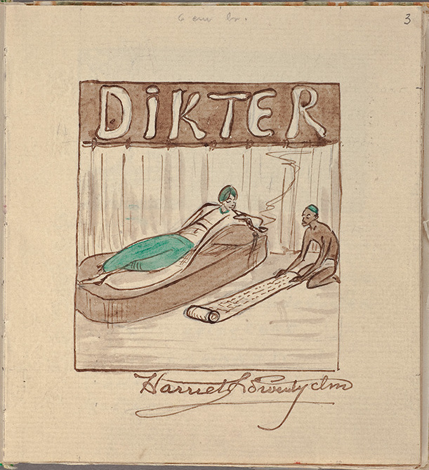 Harriet Löwenhjelm (1887-1918): Dikter. Manuscript